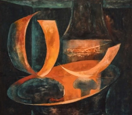 A RÉZMŰHELY (140x160 cm, olaj, vászon) A már majdnem elfelejtett mesterség, a rézművesség világát eleveníti fel a kép, sűrített formában. A gombaszerű üllőkön kalapált rézlemezek formálódása a háttérben szított tűz, a kép alsó részén jelzett nagy borács, a villanó rezek sárgája a réz patinás zöldje, a tér múltba vesző sötétje együtt adja részünkre a rézműhely valamikori atmoszféráját. (A festmény a Szolnoki Damjanich János Múzeum tulajdona)